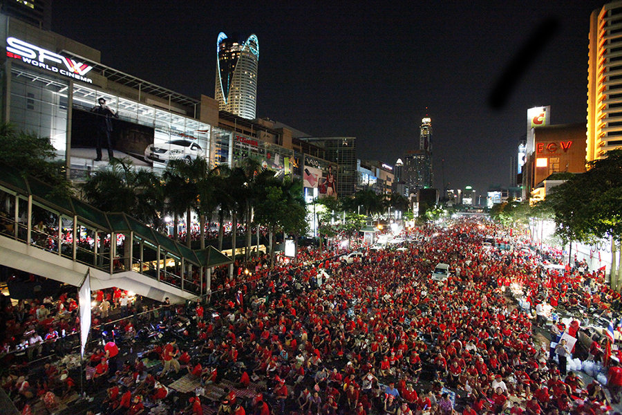 กลุ่มผู้ชุมนุมที่แยกราชประสงค์ เมื่อวันที่ 3 เมษายน.